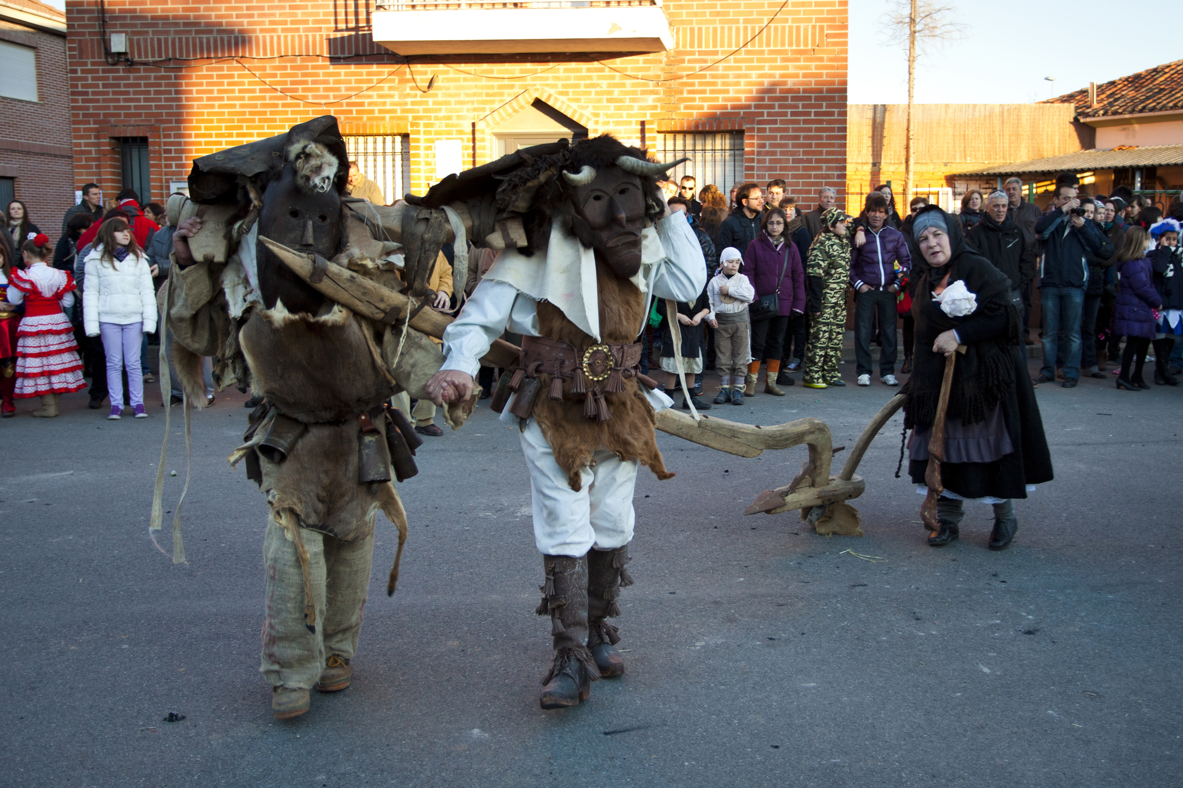 Antruejo de Velilla de la Reina, León, España. Febrero de 2012 This is a photography of a Folklore festival in Spain (Wikidata id Q23310069).